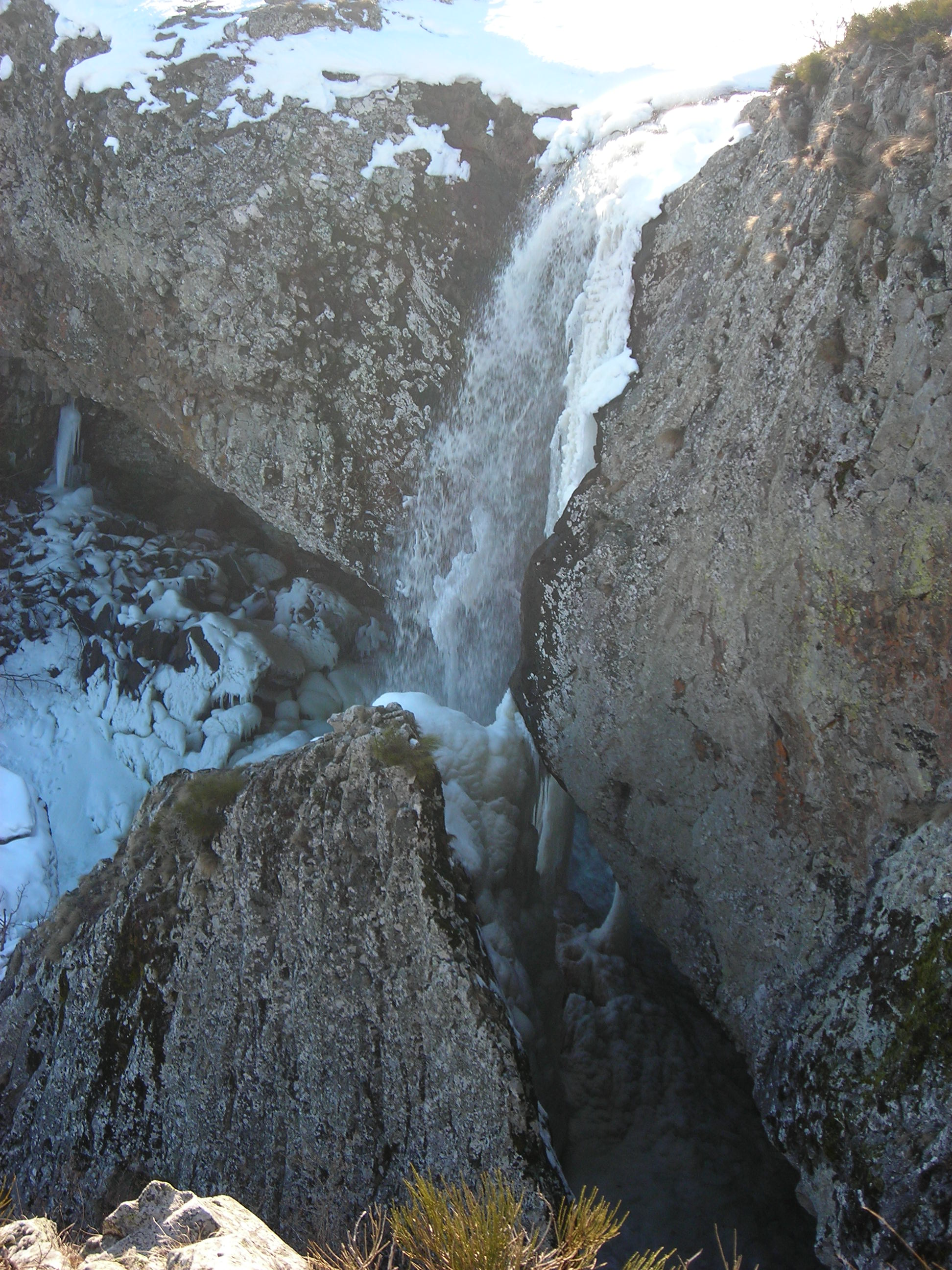 Nasbinals (Lozère, France) : La cascade du Déroc en hiver.